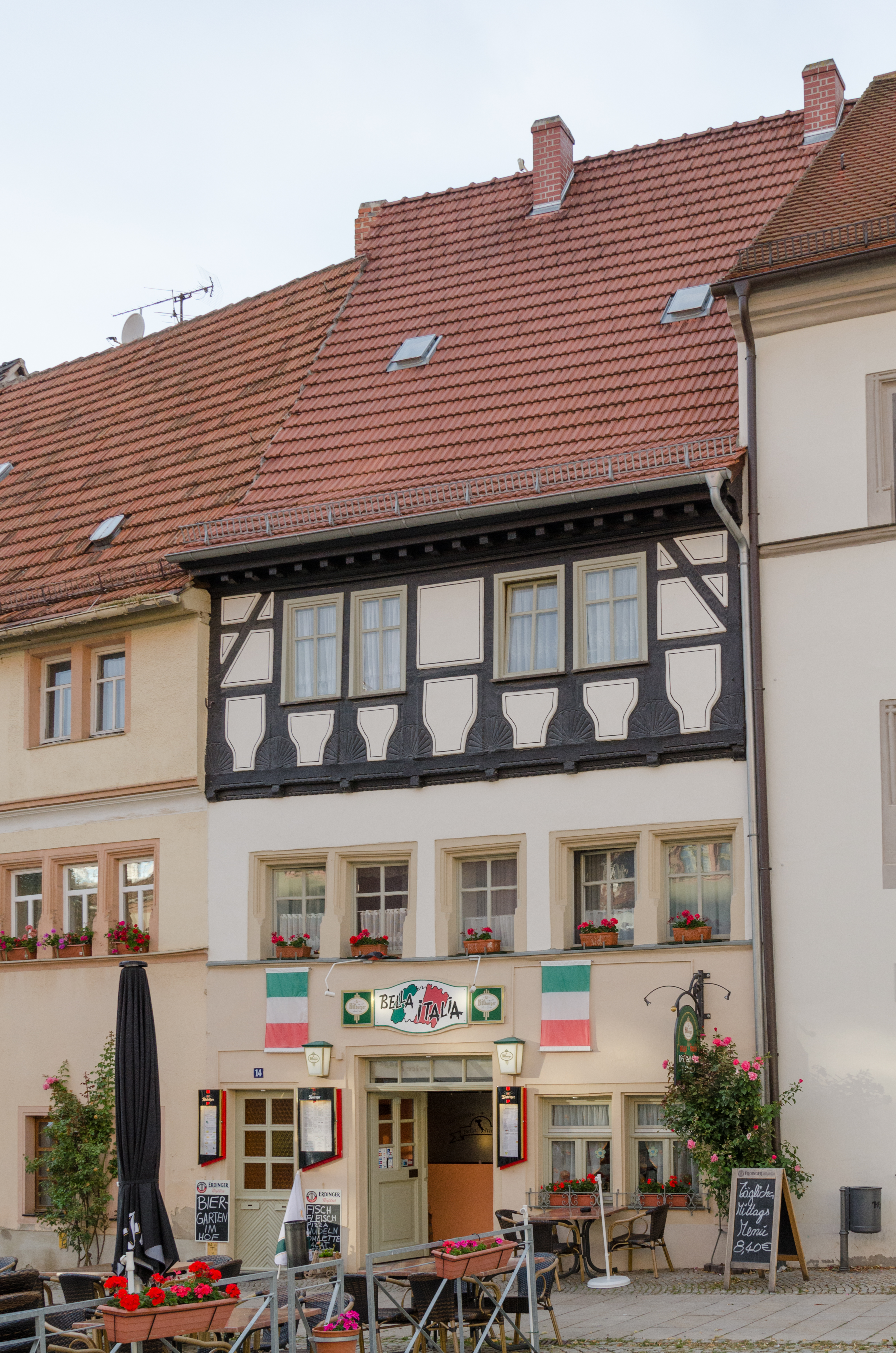 Sangerhausen, Markt 14